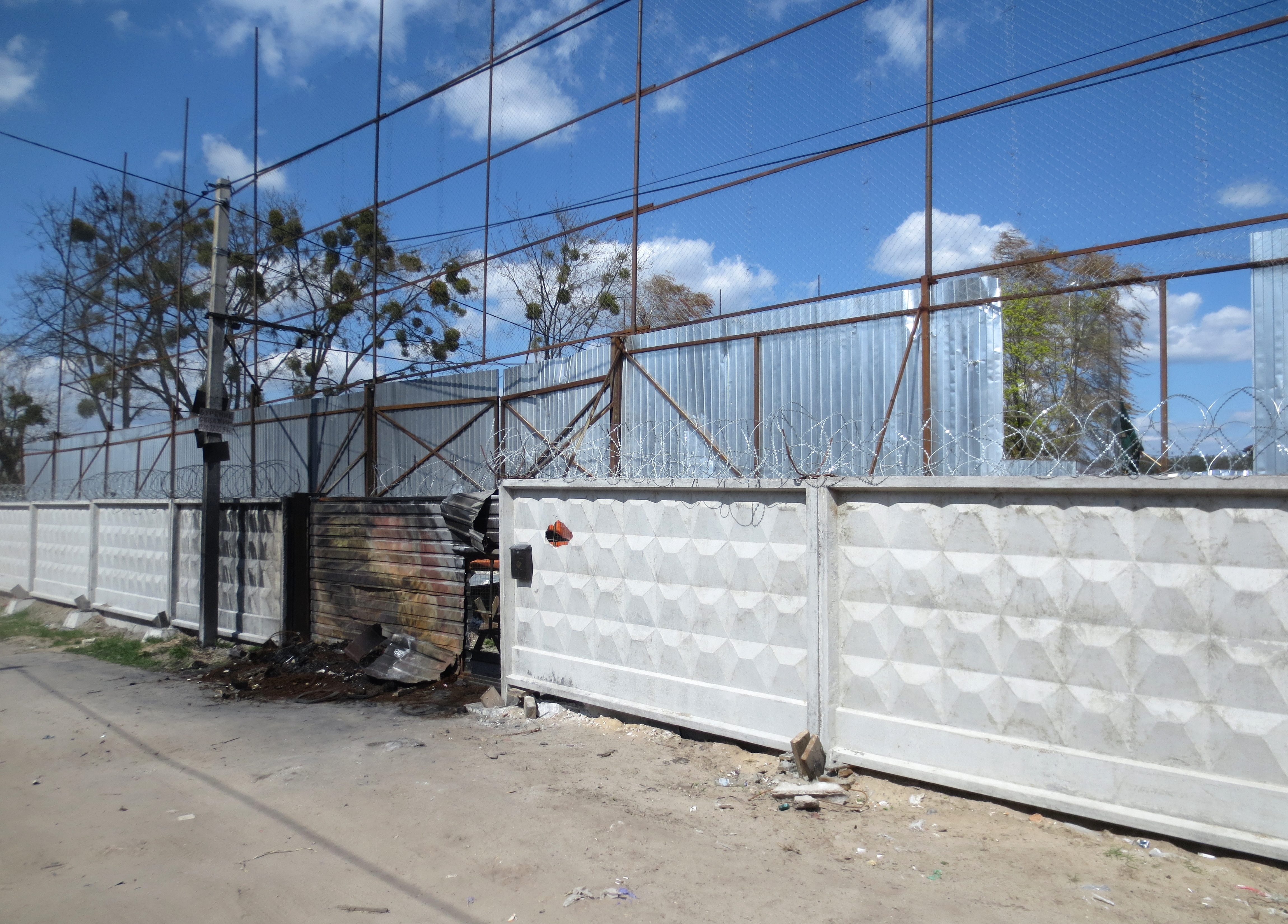 Діра в паркані, зроблена небайдужими громадянами під час руйнування дота 2018-04-18 13:52:10